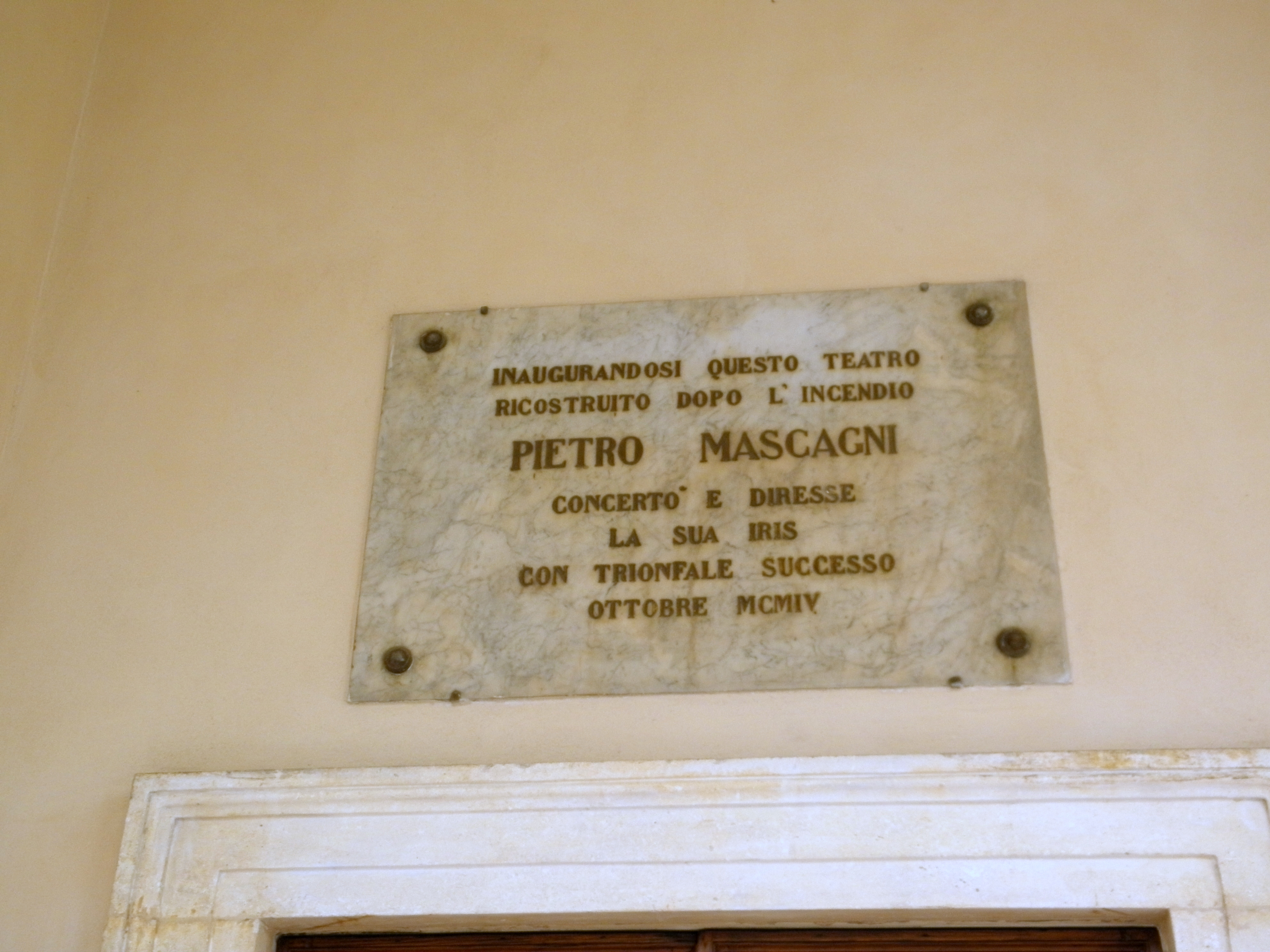 Lapide commemorativa dell'esecuzione dell'opera lirica Iris di e diretta in questo caso da Pietro Mascagni nel Teatro Sociale di Rovigo.